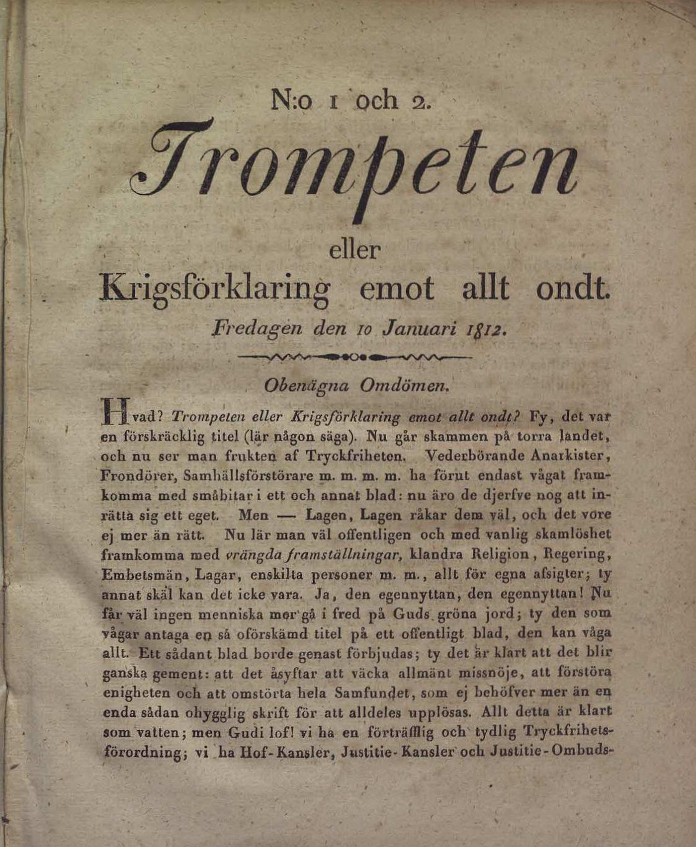 Trompeten eller Krigsförklaring emot allt ondt. Periodical.